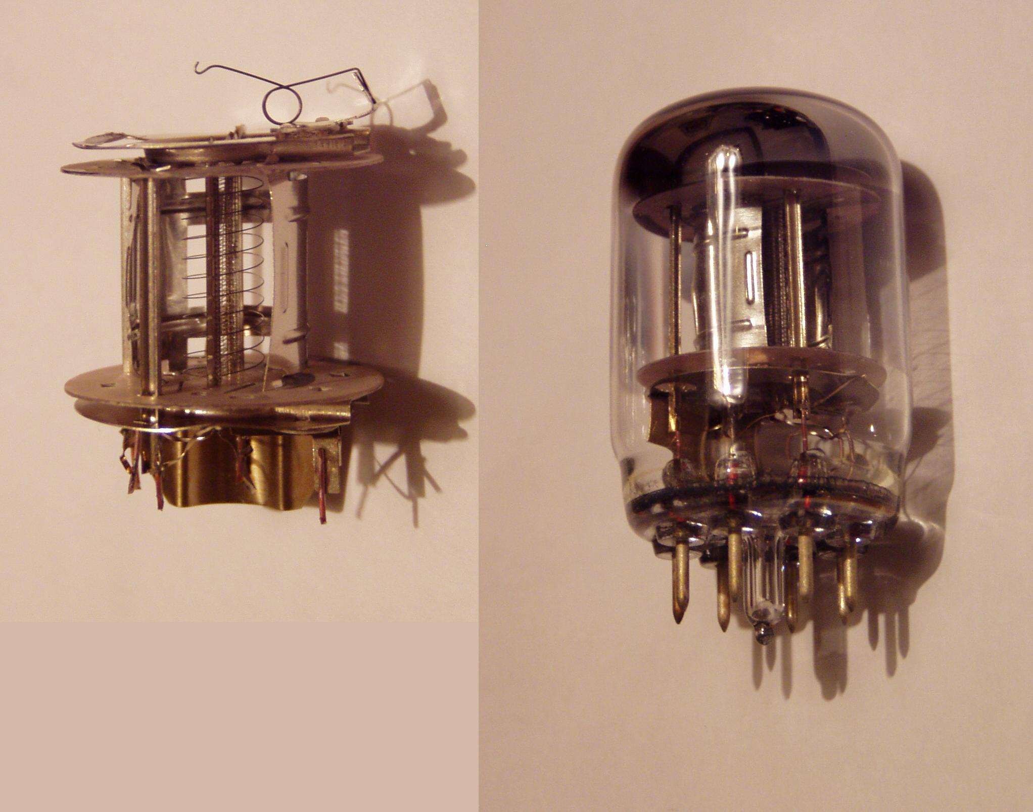 2Ж27Л Pentode - Elektronenröhre